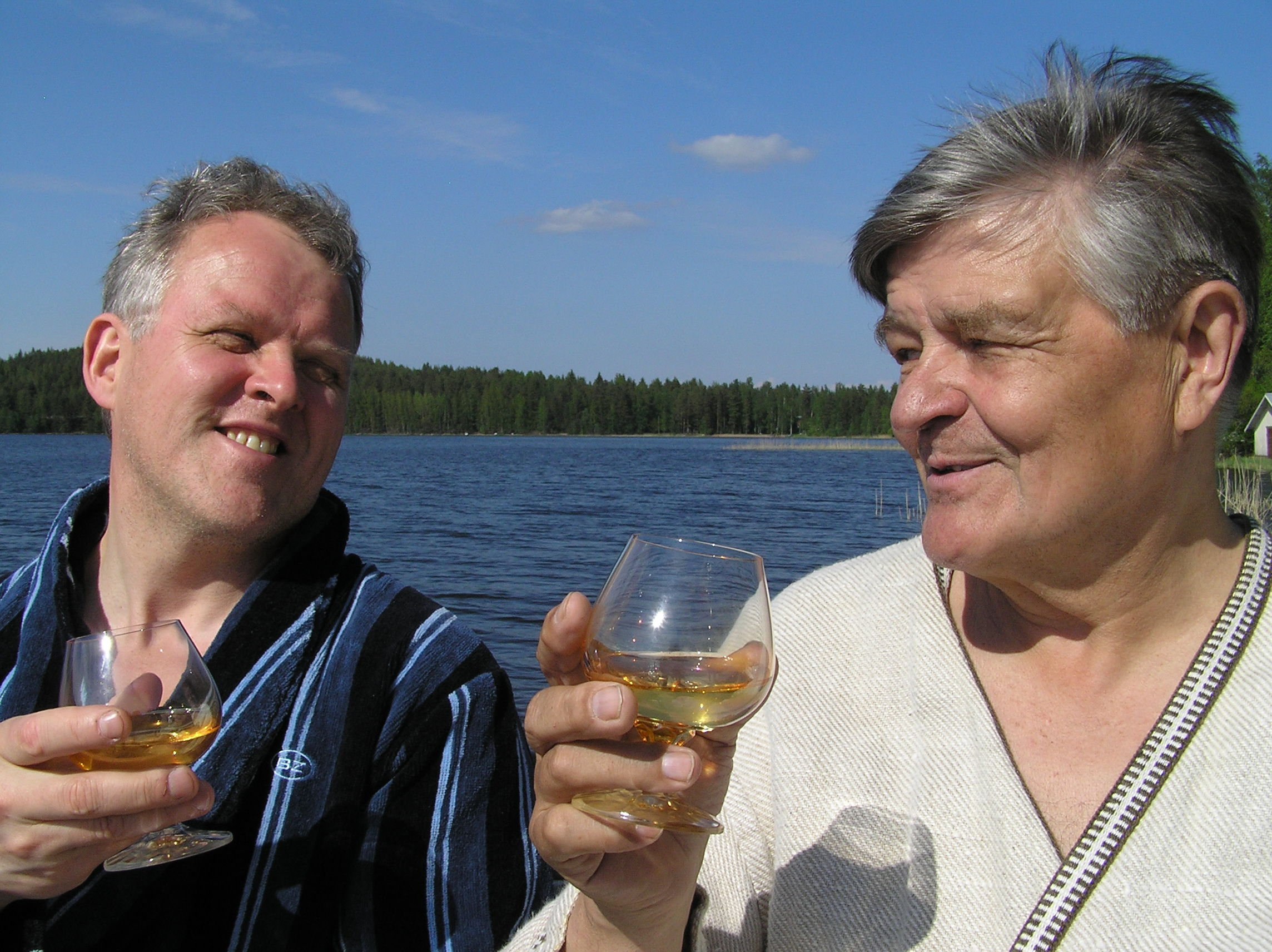 Hunttalan Matti Näytelmästä, Itti, Iitin harrastajateatteri, Leevi Lassila, Mikko Pesälä